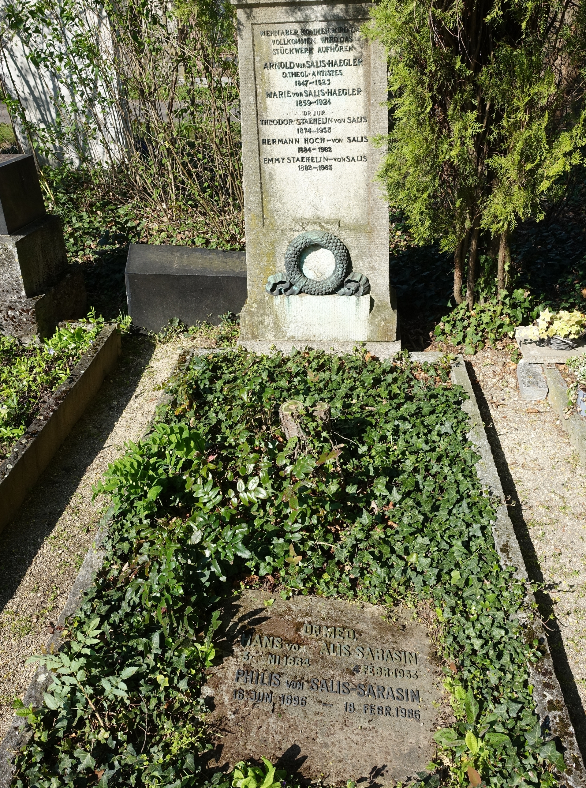 Arnold von Salis-Hägler (1847–1923) evangelisch-reformierter Theologe, Antistes der Basler Kirche, Dichter, Dramatiker, Historiker und Kunsthistoriker, Grab auf dem Friedhof Wolfgottesacker, Basel